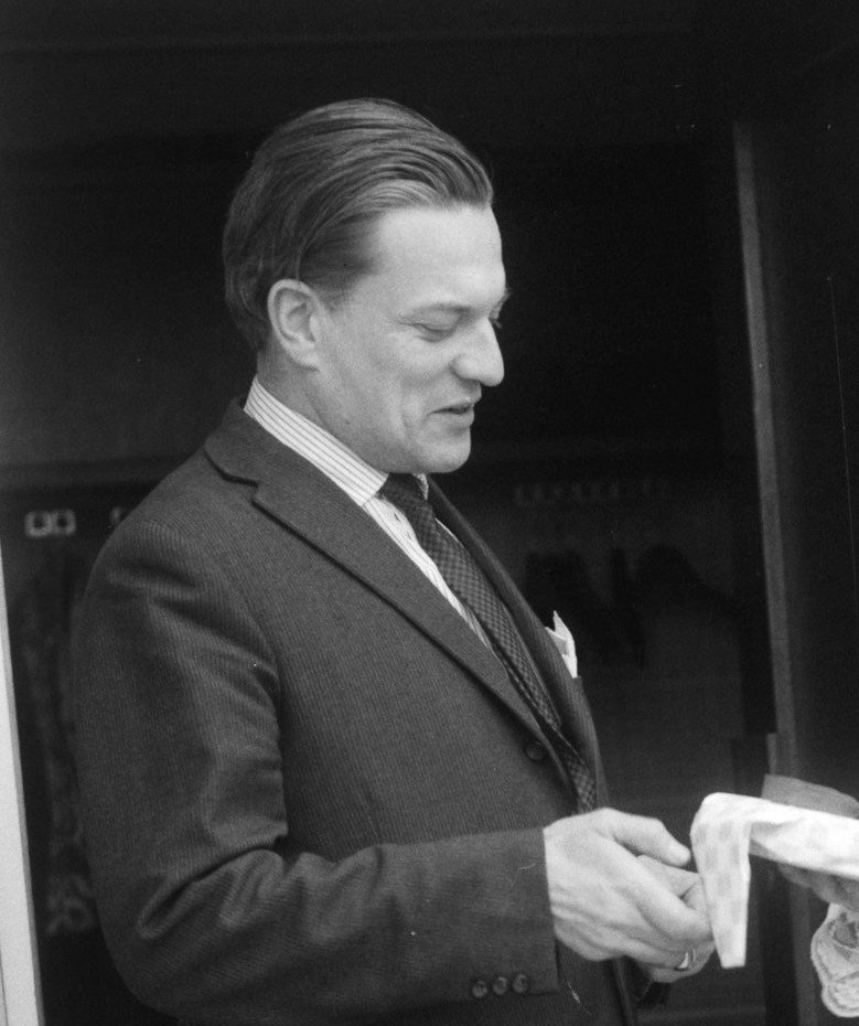 Gerard Kreuger (acteur) alias Markies de Sade biedt Burgemeester van Staphorst een boek aan